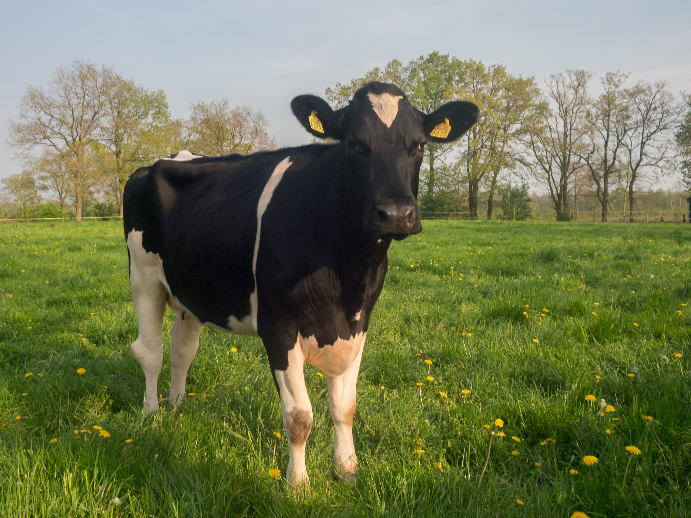 Een pink